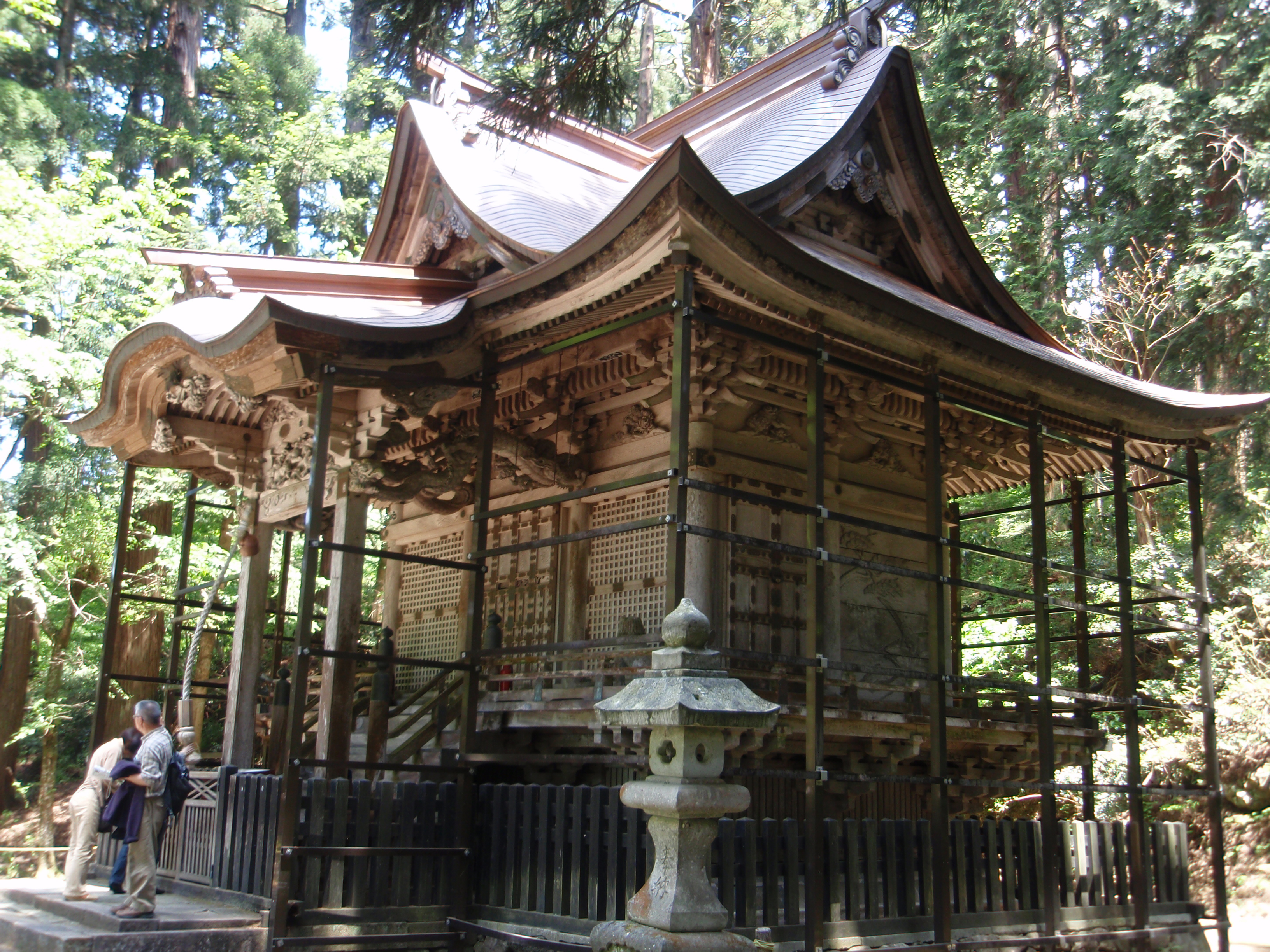 Heisenji Hakusan Shrine in Fukui prefecture,Japan